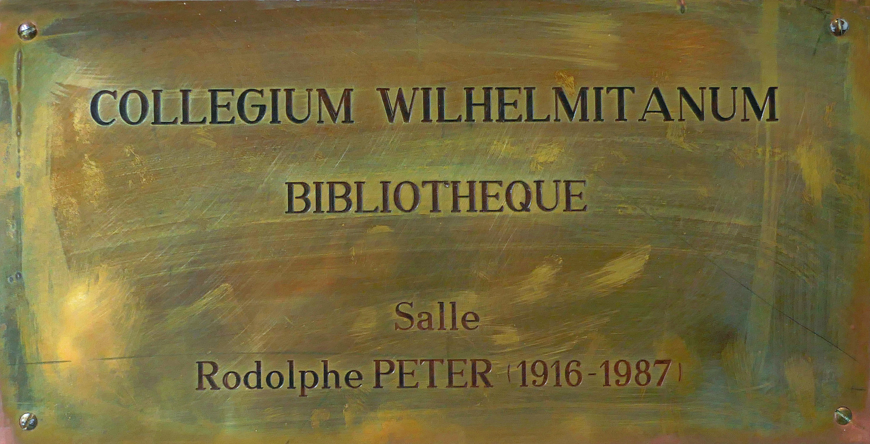 Plaque à l'entrée de la salle Rodolphe Peter à la médiathèque protestante de Strasbourg.